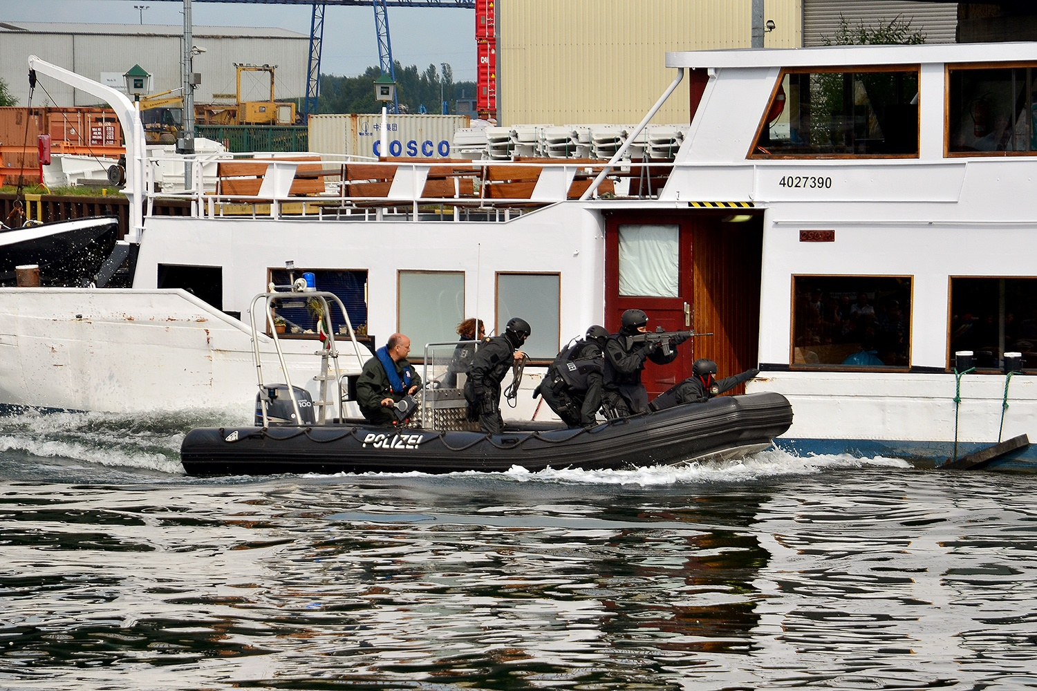 Landespolizeifest NRW 2013, Dortmund, Datum/Uhrzeit: 13.07.2013 10:38:34